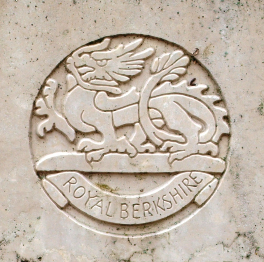 Cimetière communal de Vouziers (Ardennes, France) : sépulture militaire britannique du Royal Berkshire Regiment.